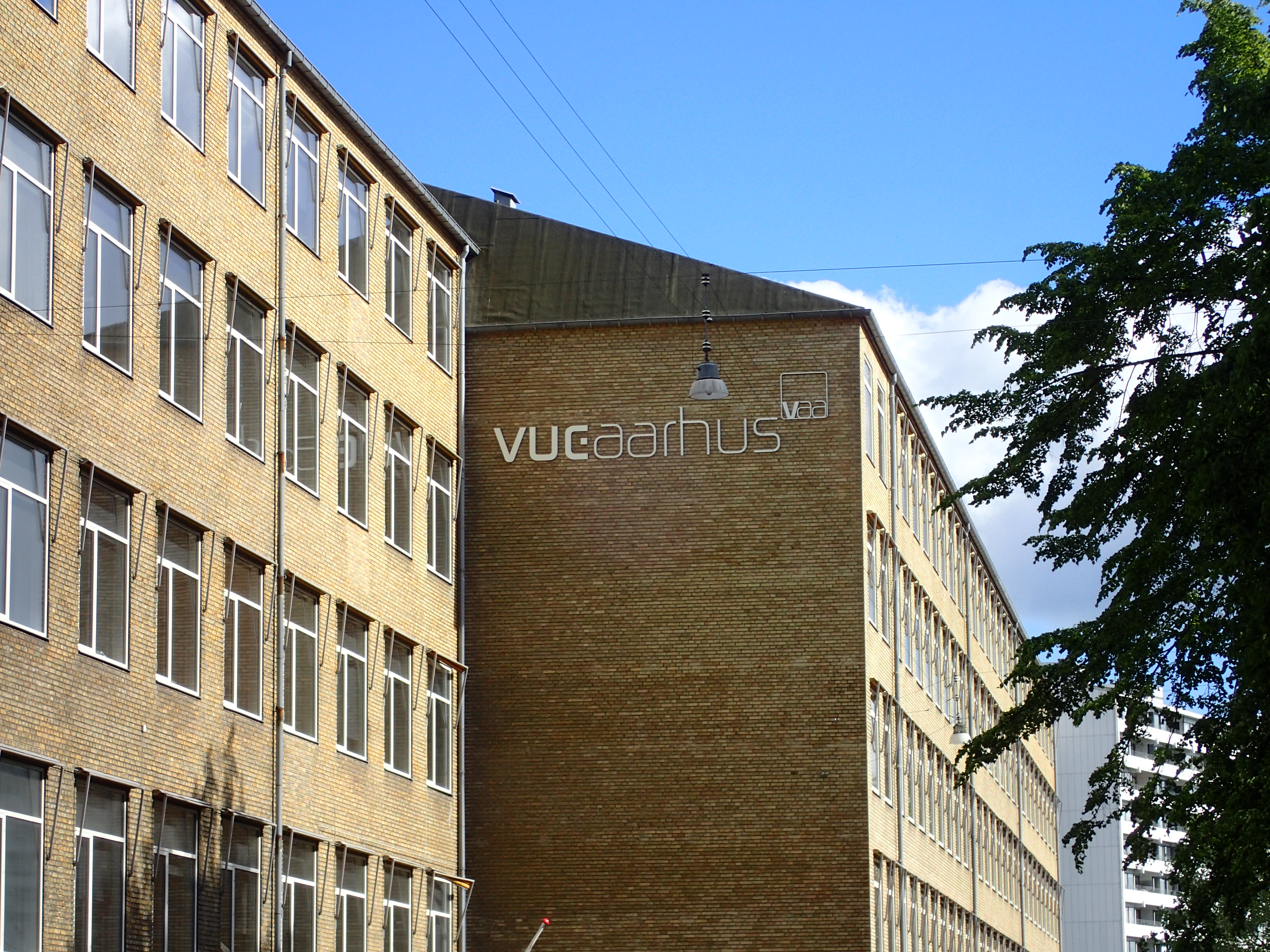 VUC Aarhus. N.J. Fjords Gade, Indgang B.